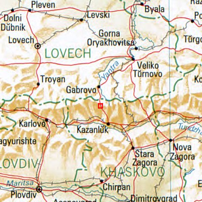 Schipkapass - Lage des Ortes in Bulgarien